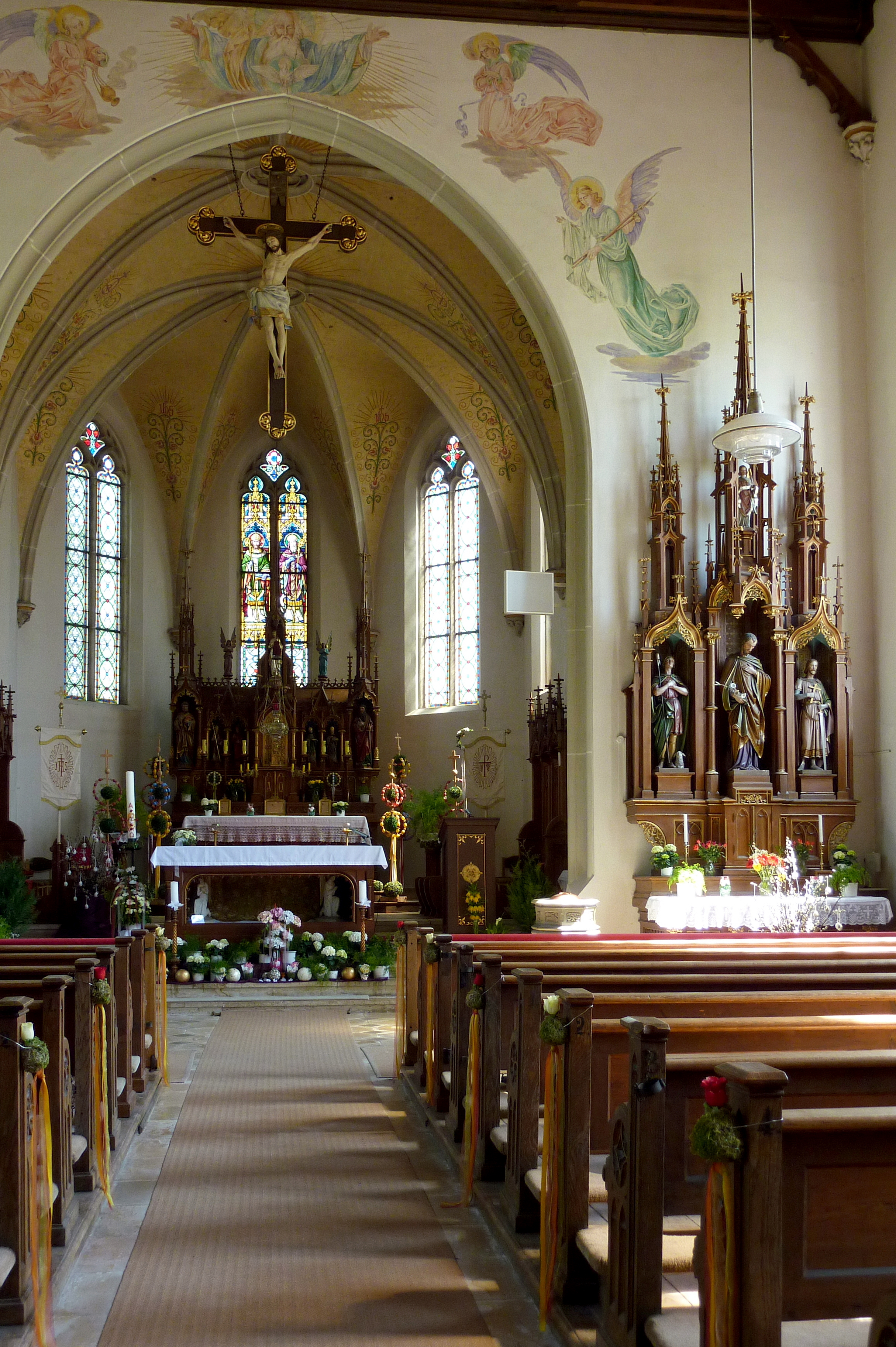 Katholische Pfarrkirche St. Martin in Staufen (Gemeinde Syrgenstein) im Landkreis Dillingen an der Donau, Innenansicht mit Blick zum Chor